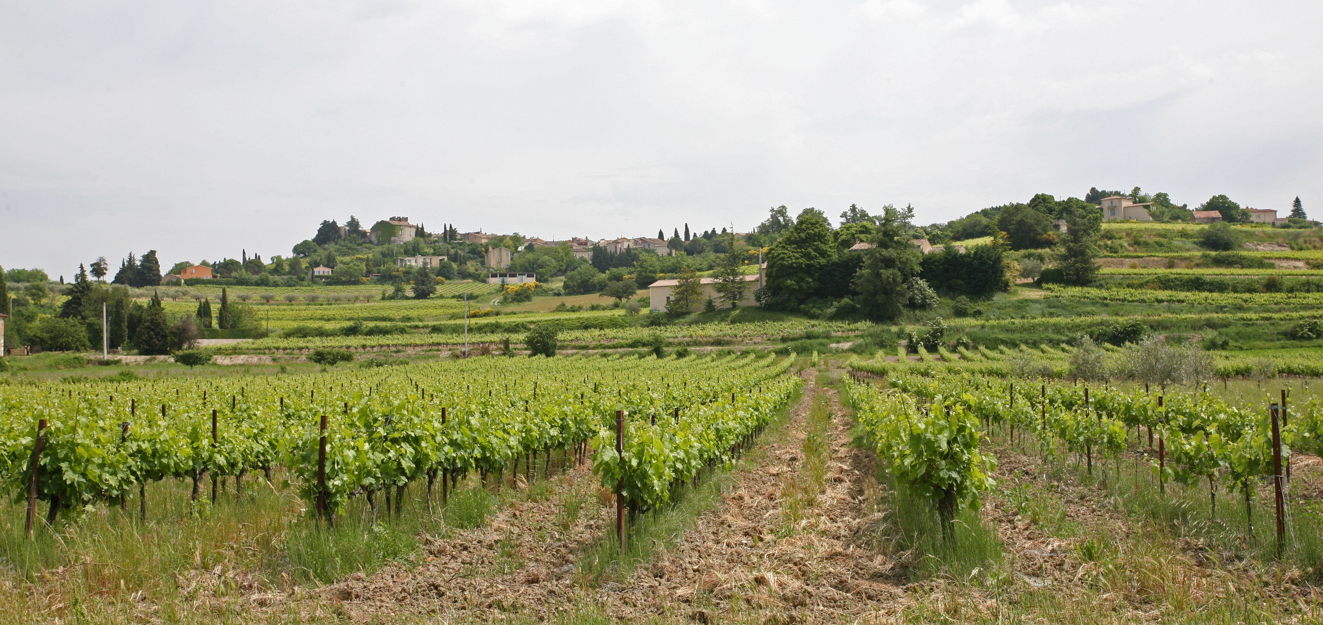 Villedieu et ses vignes (Vaucluse)